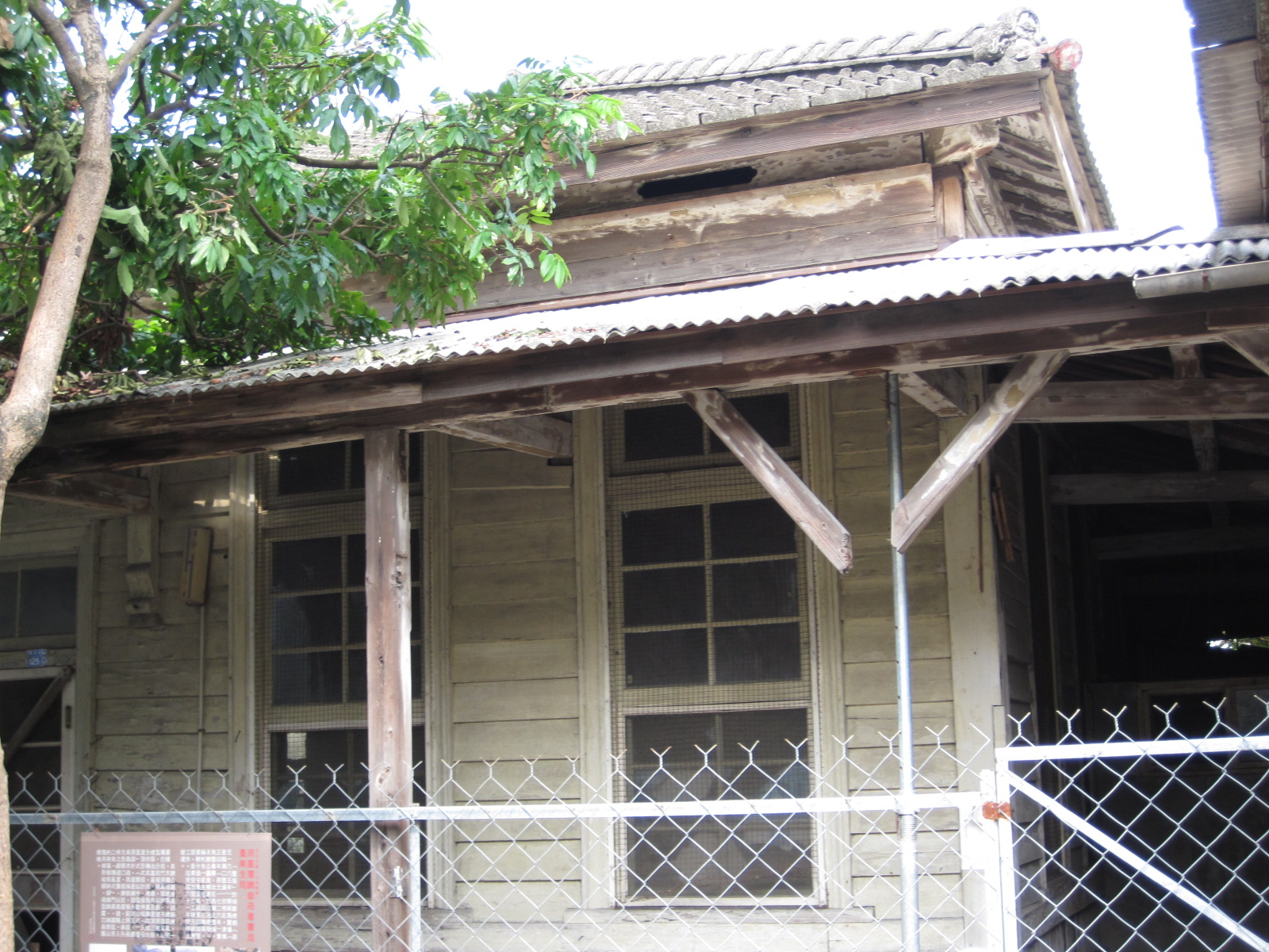 專賣局臺南鹽埕分室東面一角